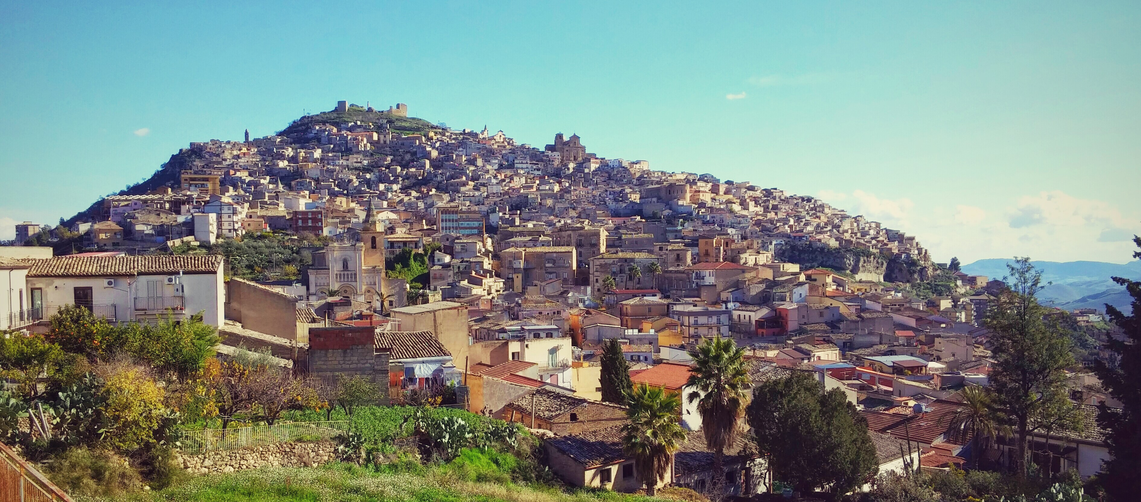 Il paese di Agira adagiato sul monte Teja